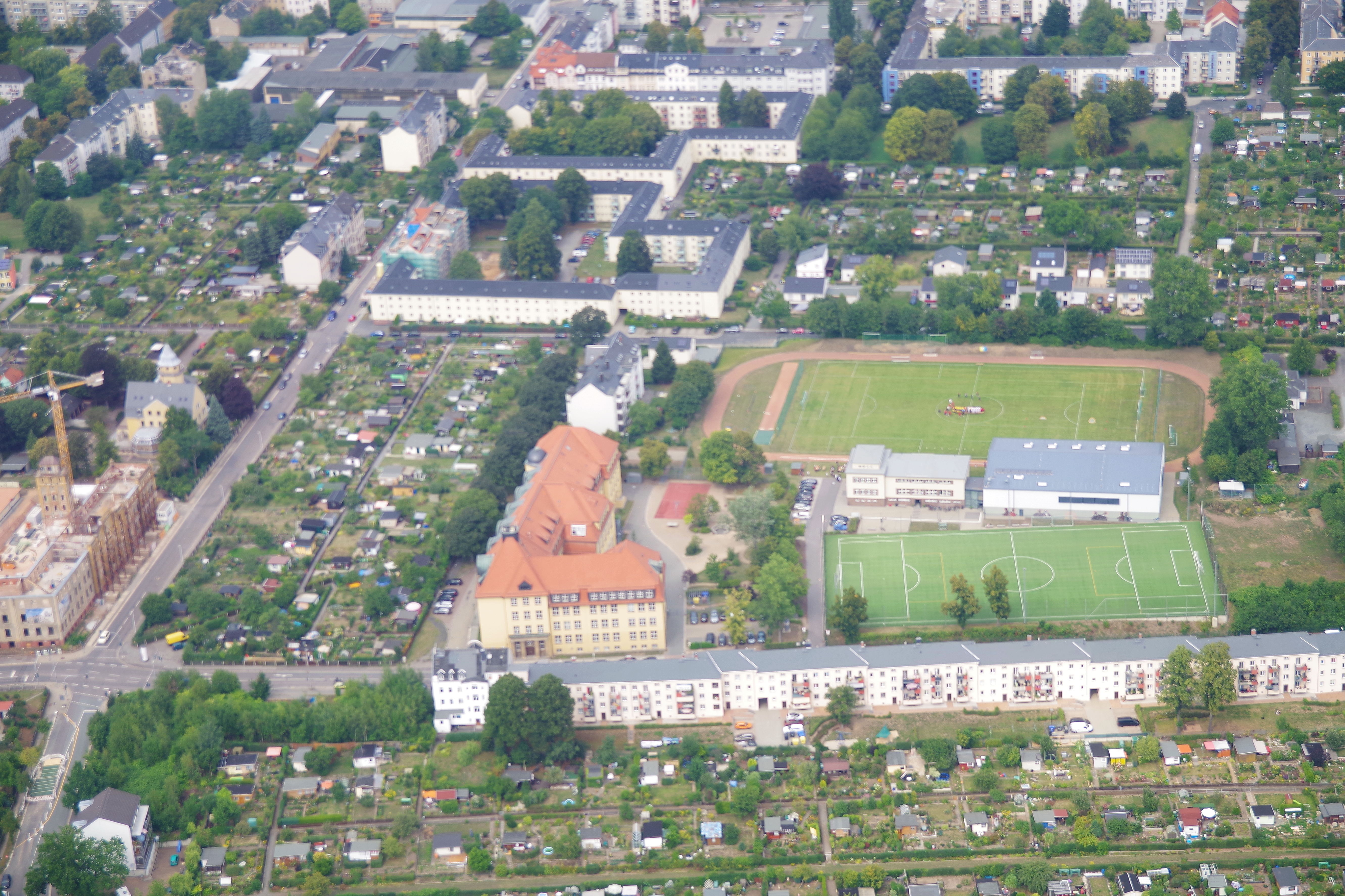 Humboldthöhe in Chemnitz mit Humboldtgymnasium